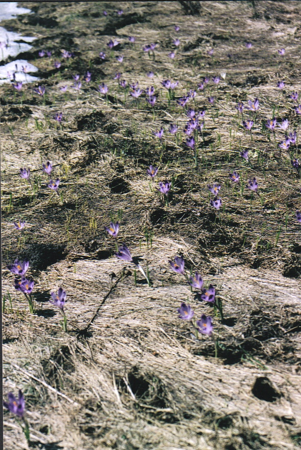 Crocus scepusiensis, gefotografeerd in Gorczanski Park Narodowy (Polen)